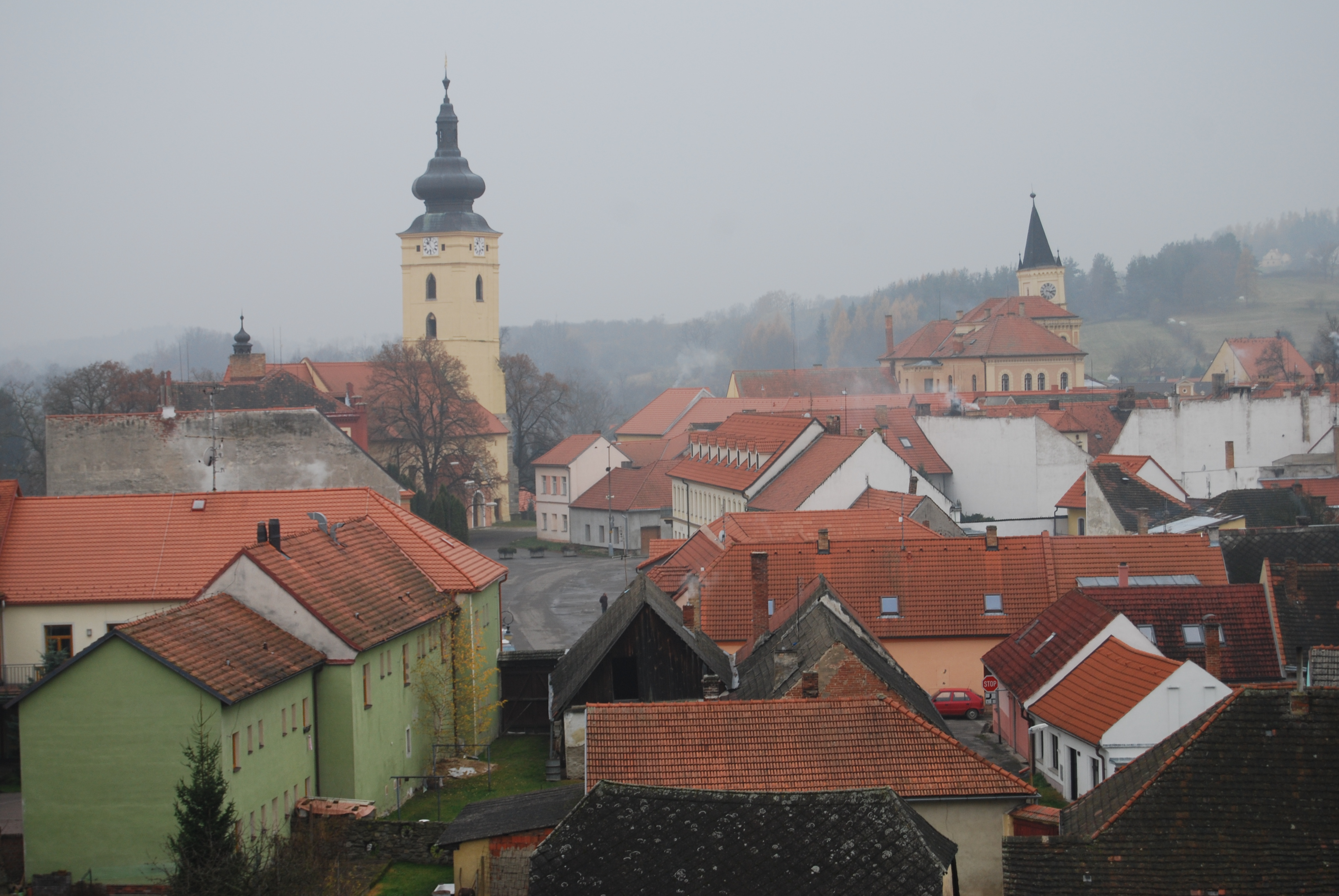 Pohled z Archeoparku Netolice na vrchu Svatý Ján na okraji města. Netolice. Okres Prachatice. Jihočeský kraj. Česká republika.